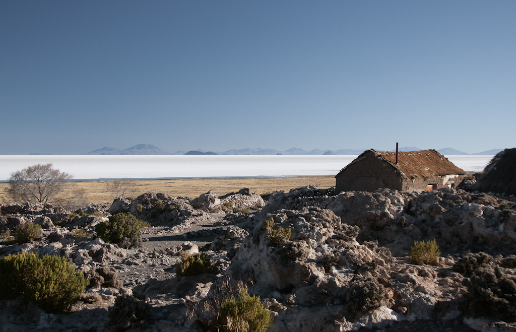 vista de la población de Coquesa, en el departamento de Potosí a orillas del salar de Uyuni, Bolivia.